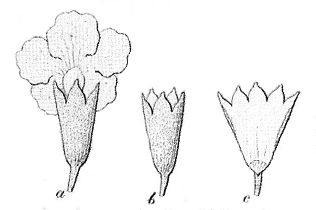 Franciscea confertifolia = Brunfelsia brasiliensis